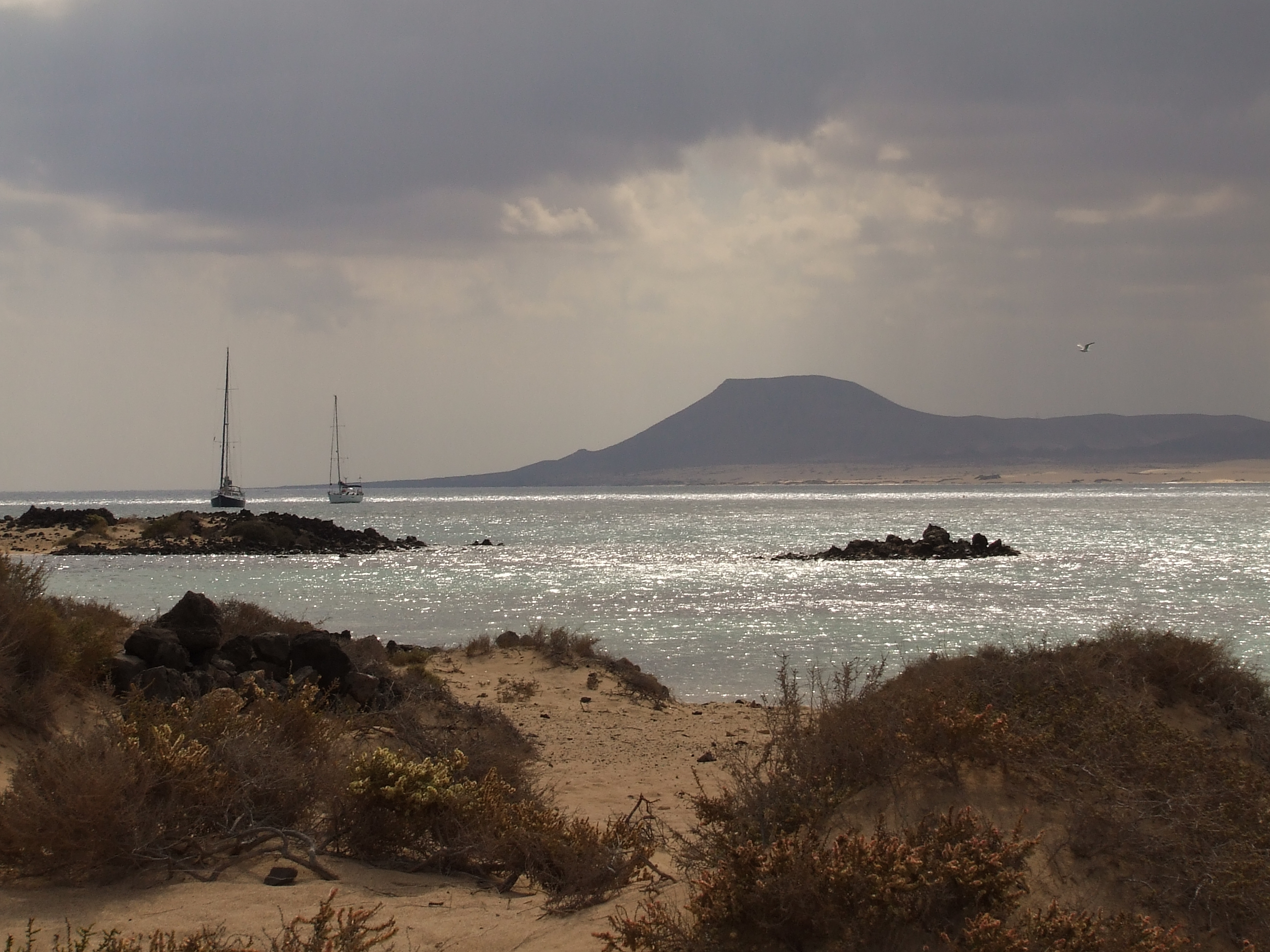 Costa di Fuerteventura vista dall'Isola di Lobos